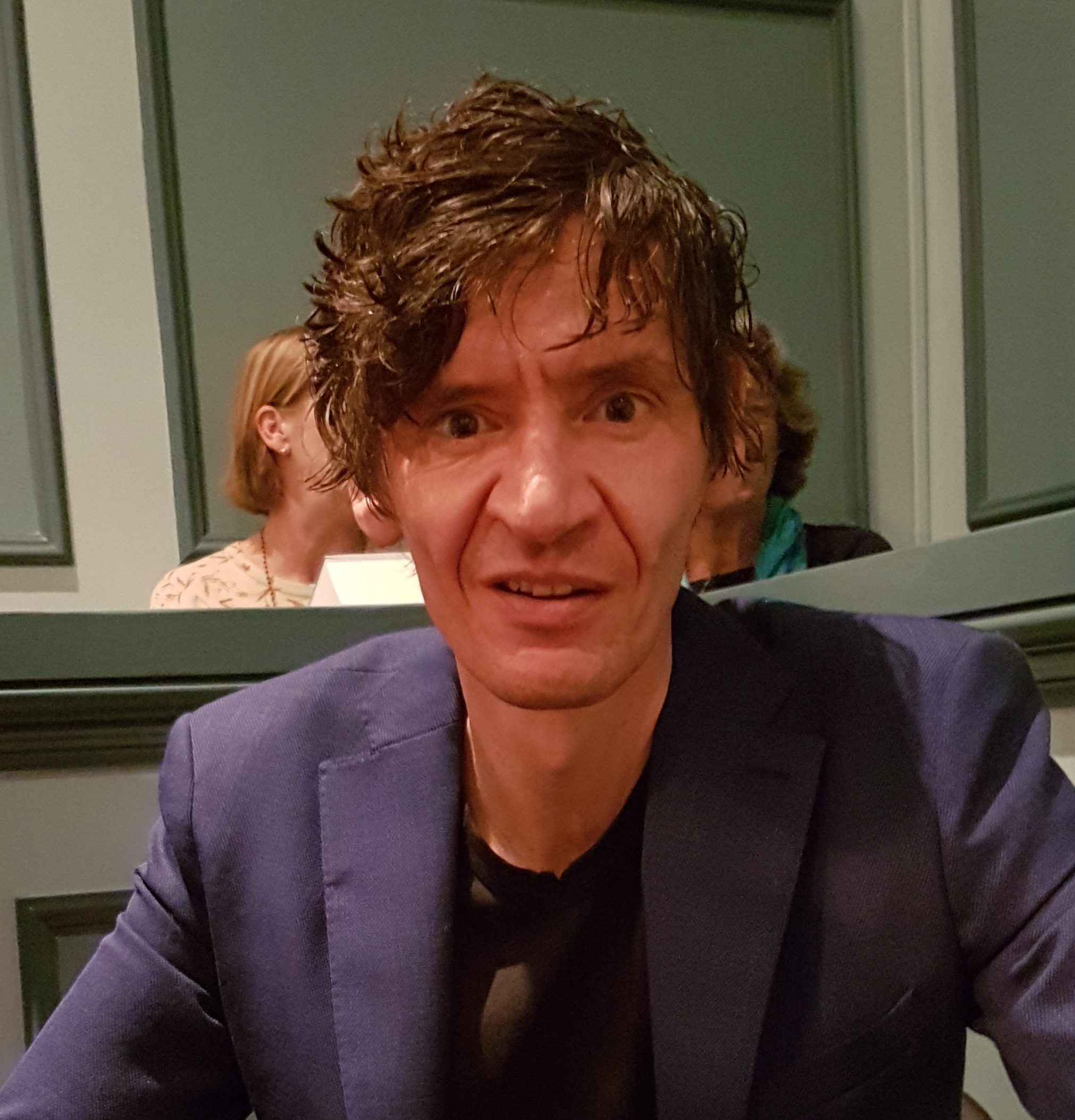 Peter Buwalda op een lezing in de doopsgezinde kerk in Winterswijk